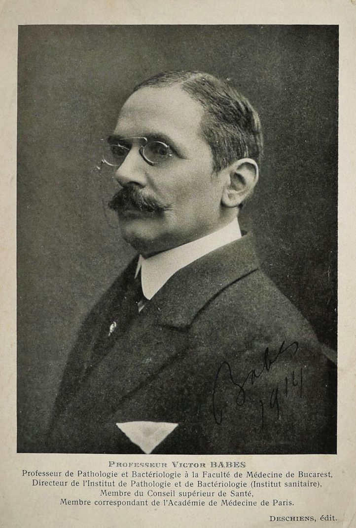 Victor Babeş (1854-1926), microbiologist